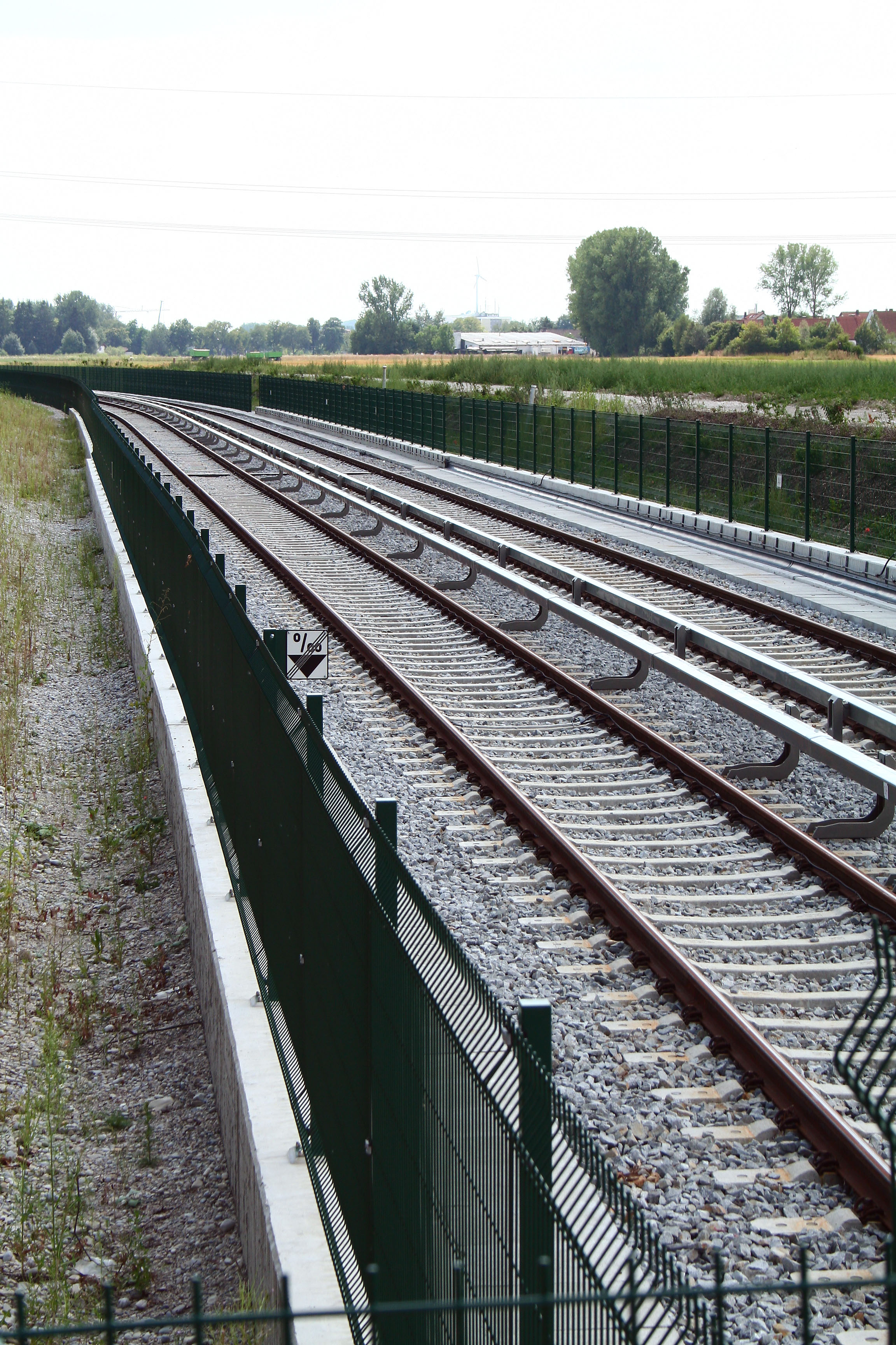 Die Linie U6 aus Richtung Garching kommend.